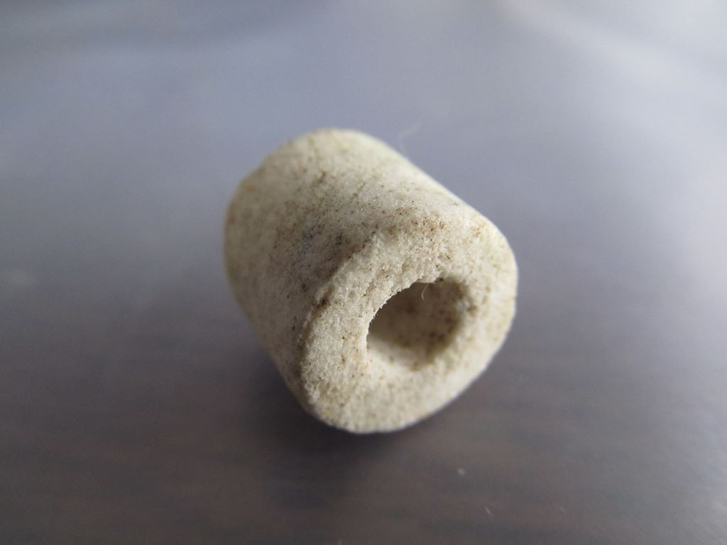 ガラス系多孔質ろ材(Aquarium Glass rings)